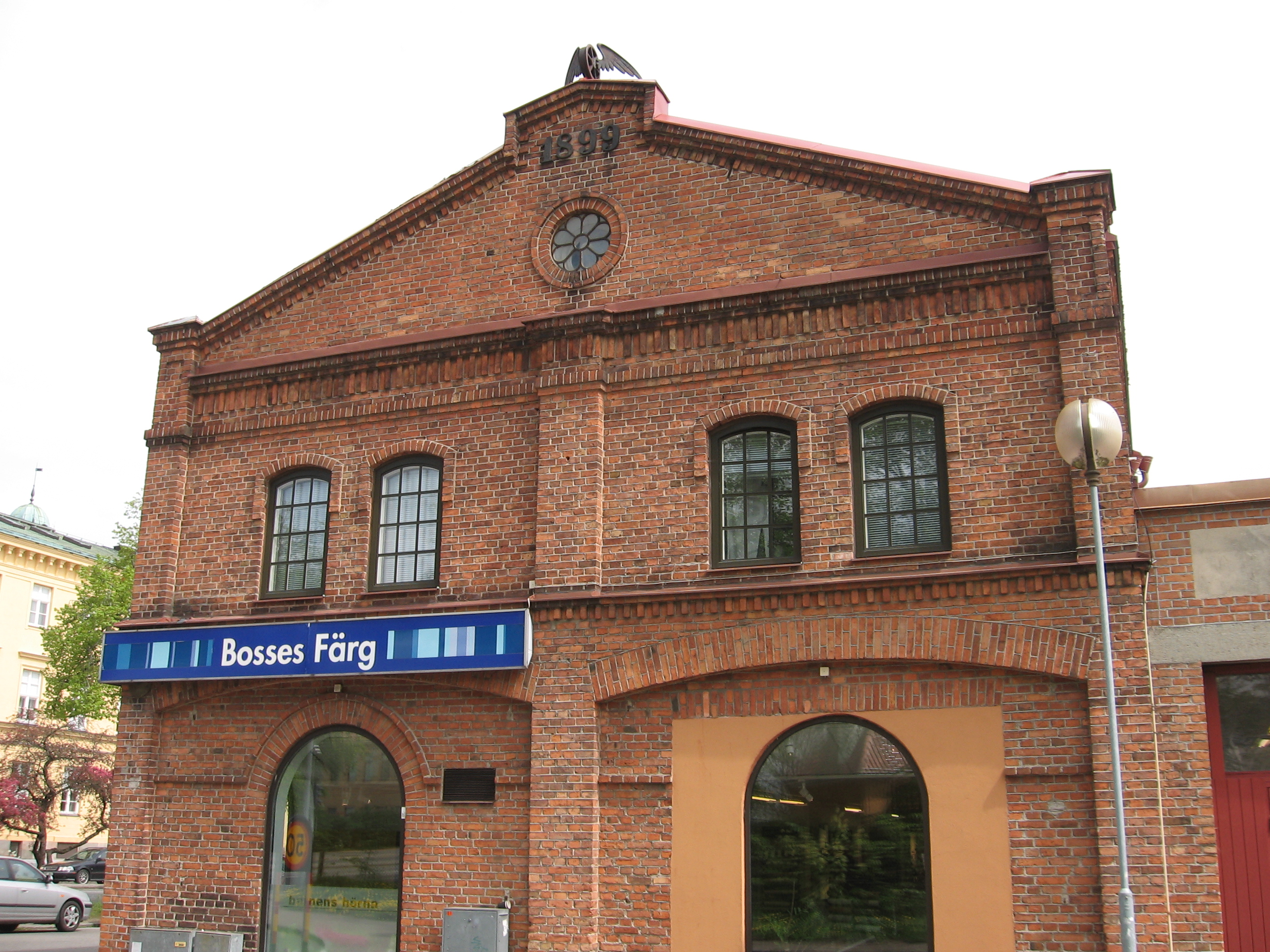 Ljunggrens verkstad, Kristianstad.